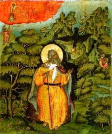 Profeta Elia nel deserto